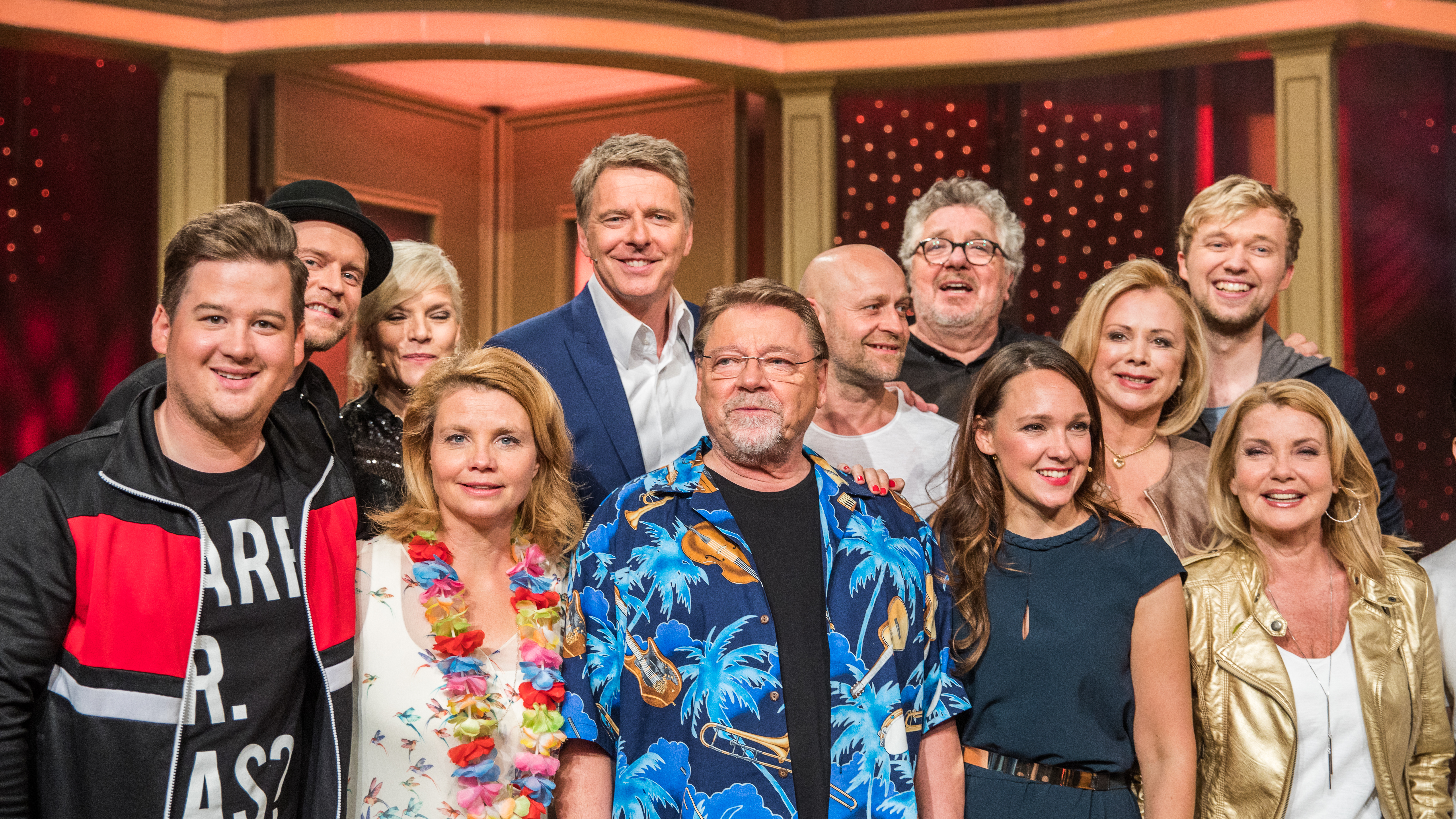 „Mensch Jürgen - von der Lippe wird 70“. Die Geburtstagsshow wird präsentiert von Jörg Pilawa. Fototermin nach Ende der Aufzeichnung. Sendetermin: 9. Juni 2018 um 20.15 Uhr im ErstenGruppenfoto